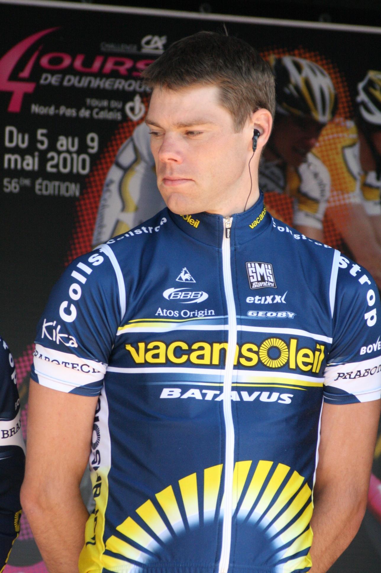 Wouter Mol lors de la présentation des équipes des 4 jours de Dunkerque